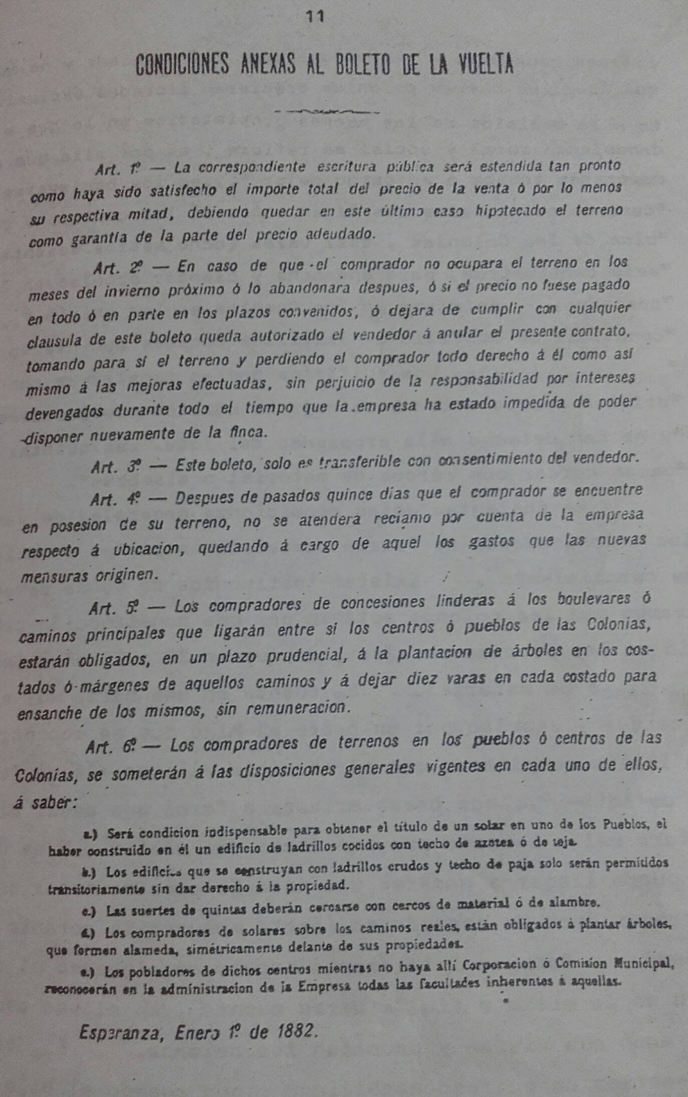 Condiciones anexas al boleto de vuelta.